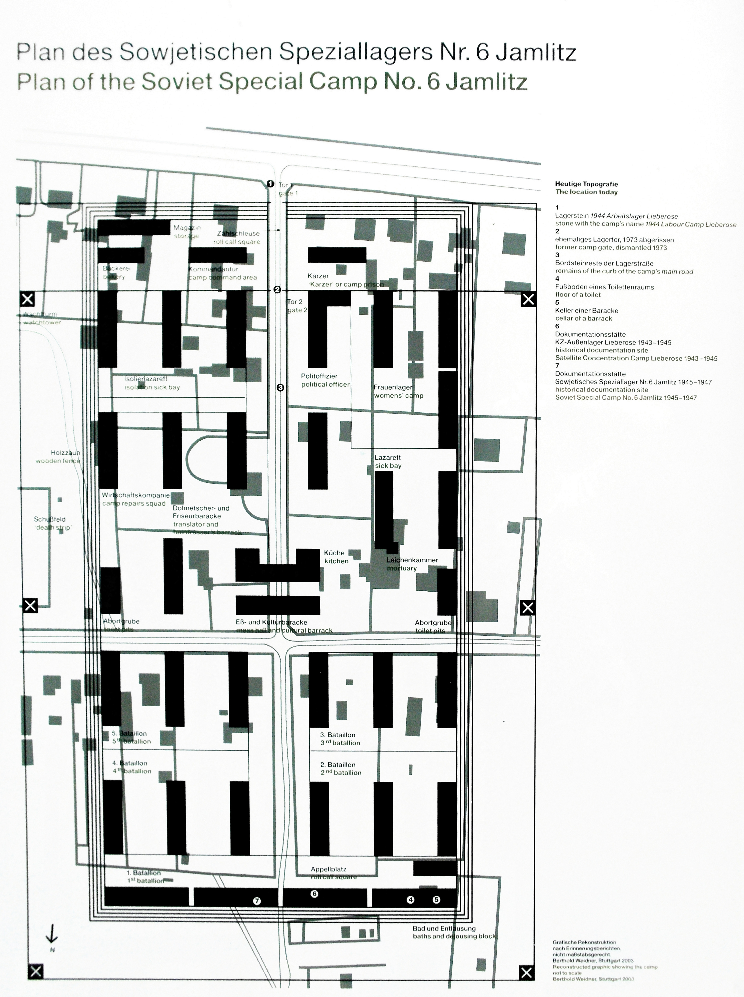 Jamlitz, Brandenburg, Germany, Plan des Speziallagers Nr. 6